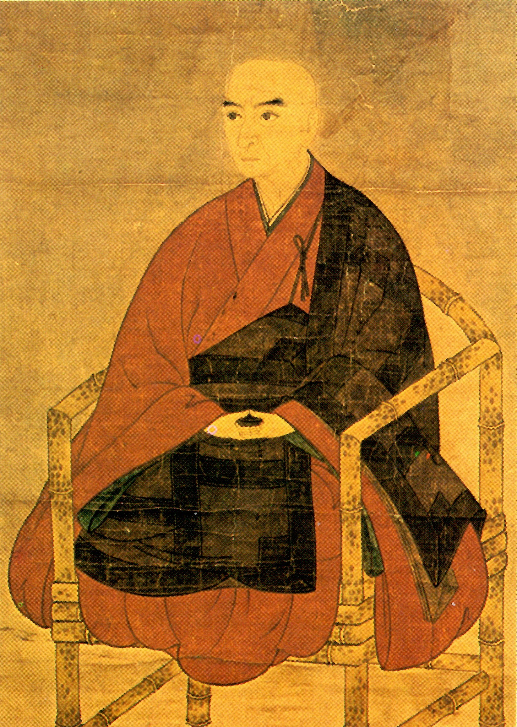 大内盛見の肖像。